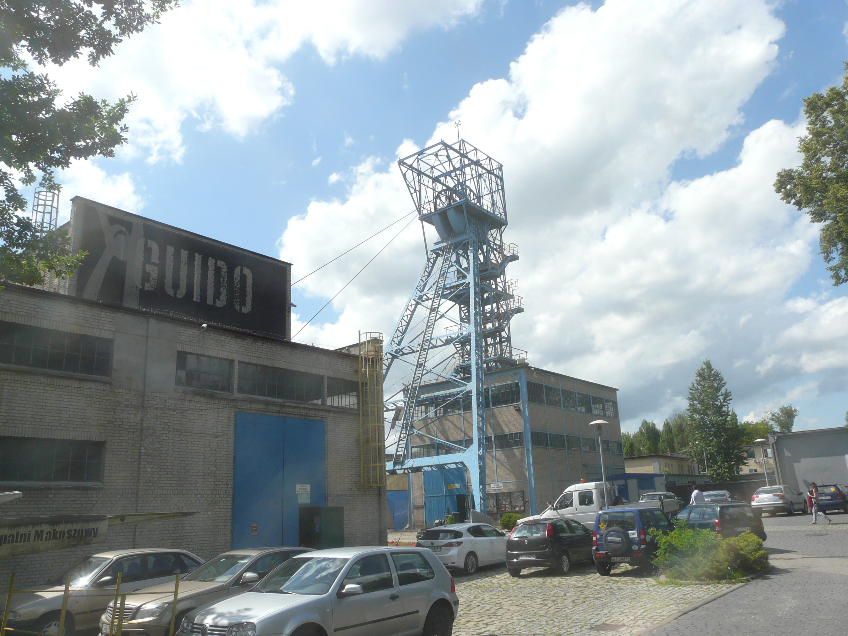 Subterranean Mine Skansen "Guido"